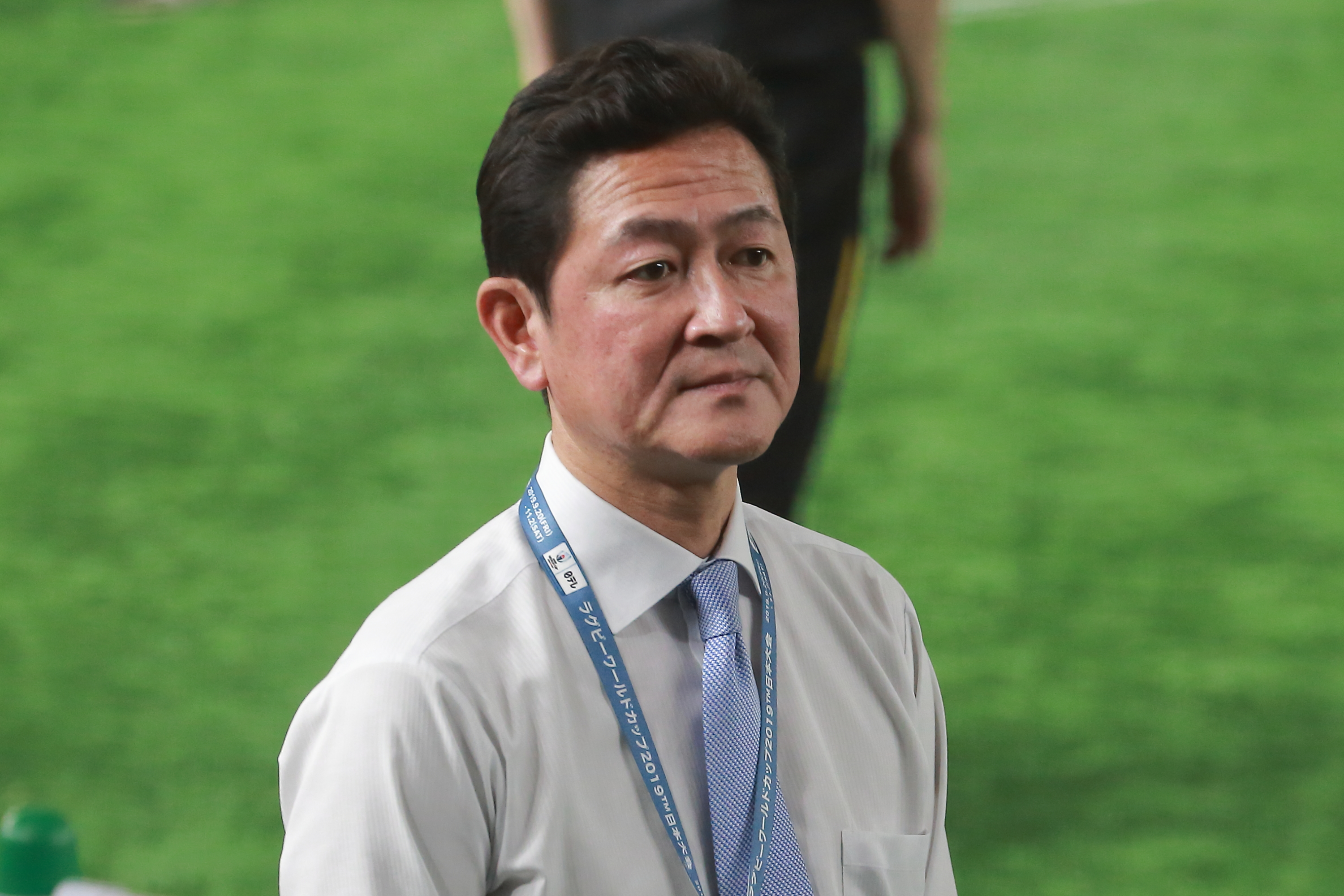 日本テレビアナウンサーの河村亮。2019年6月21日、東京ドームにて撮影。